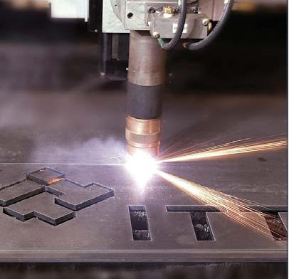 Sistema de corte Inova